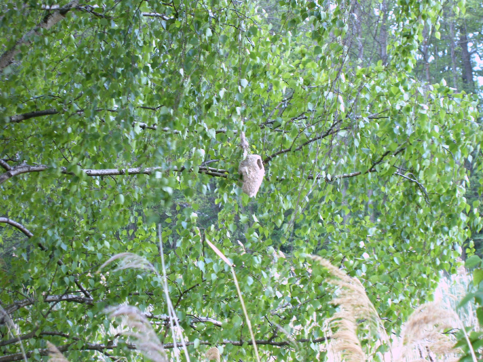 Nest der Beutelmeise (Remiz pendulinus)